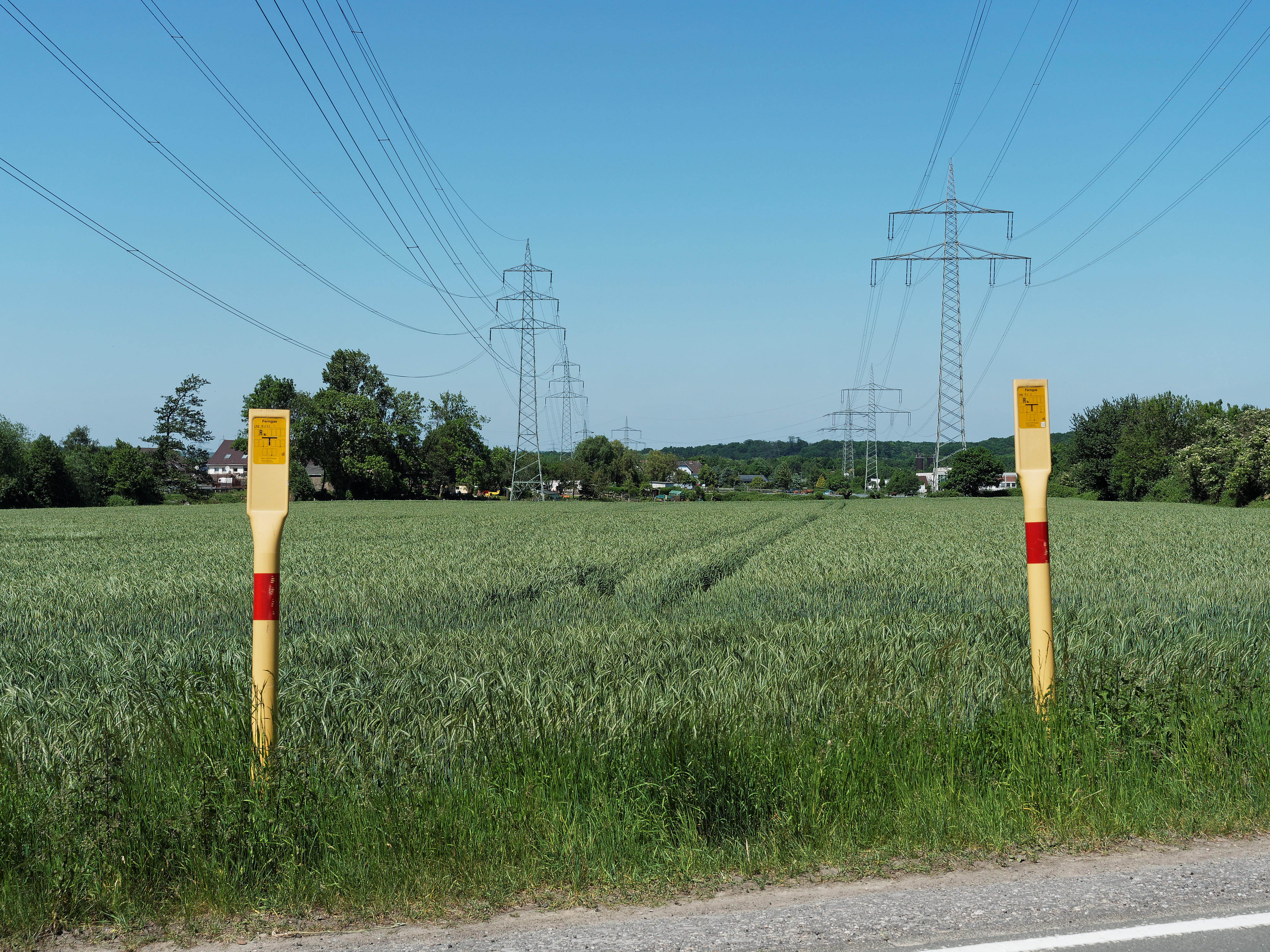 Das LSG Behringhausen in Castrop-Rauxel von der Karlstraße aus gesehen, CDDA-Code:555554116; Freileitungen Bl. 1691 (links, 110 kV) und Bl. 2610 (rechts, 220 kV), vorne zwei Ferngas-Richtpfähle (Open Grid Europe)